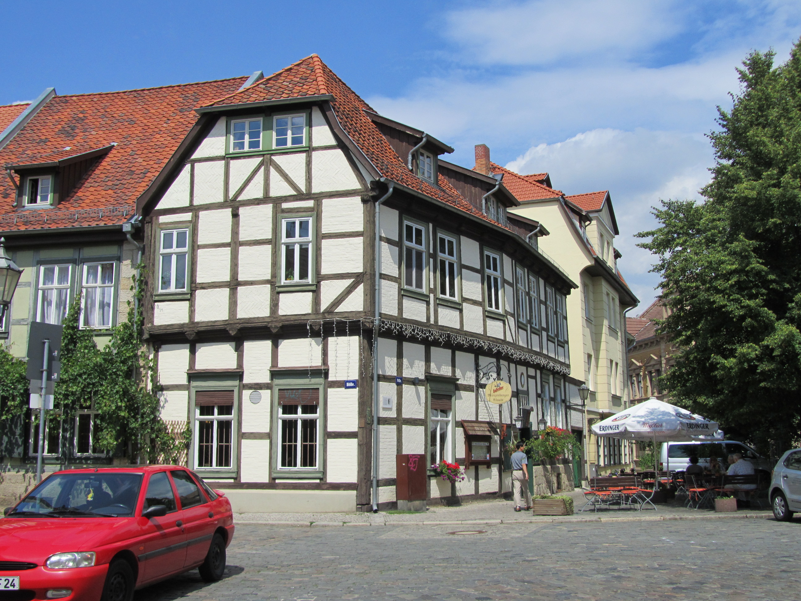 IMG_3880 in Quedlinburg